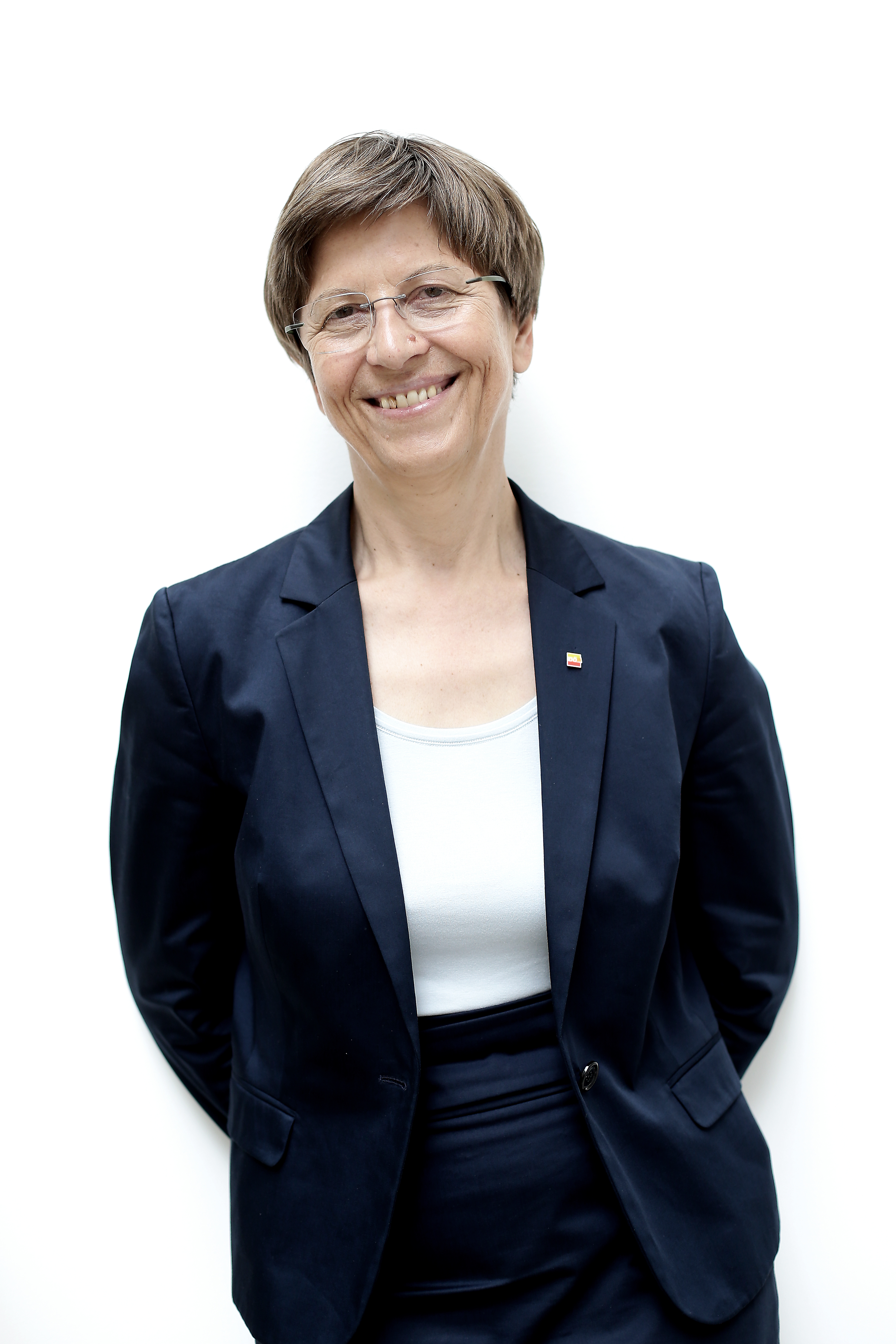 Oberösterreichische Soziallandesrätin Gertraud Jahn SPÖ